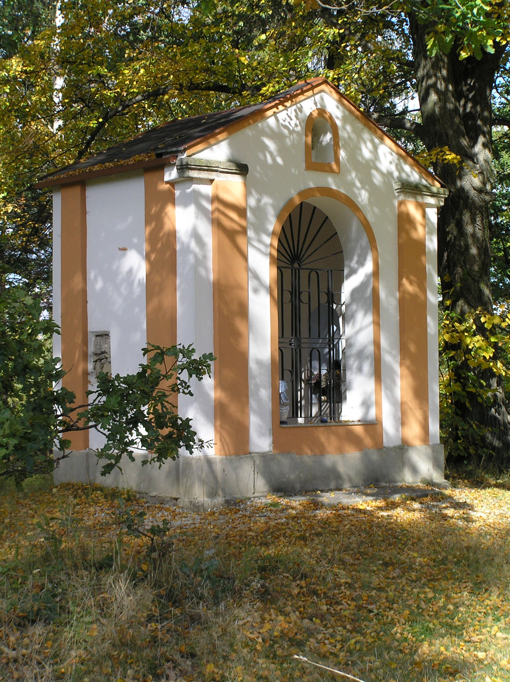 Petrova kaple v Radčicích